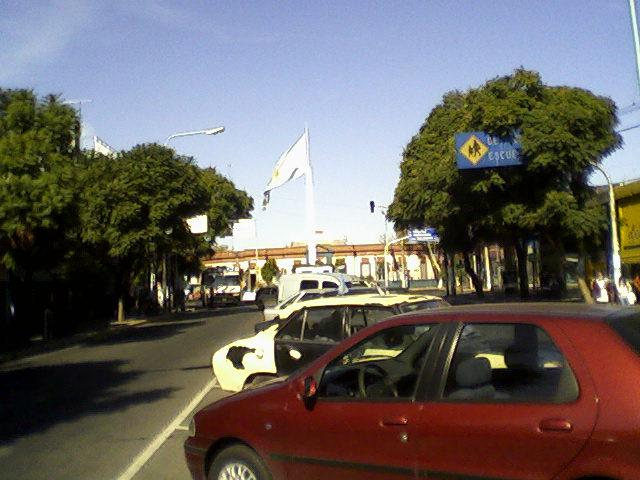 Avenida del Libertador San Martín, Merlo's main street.